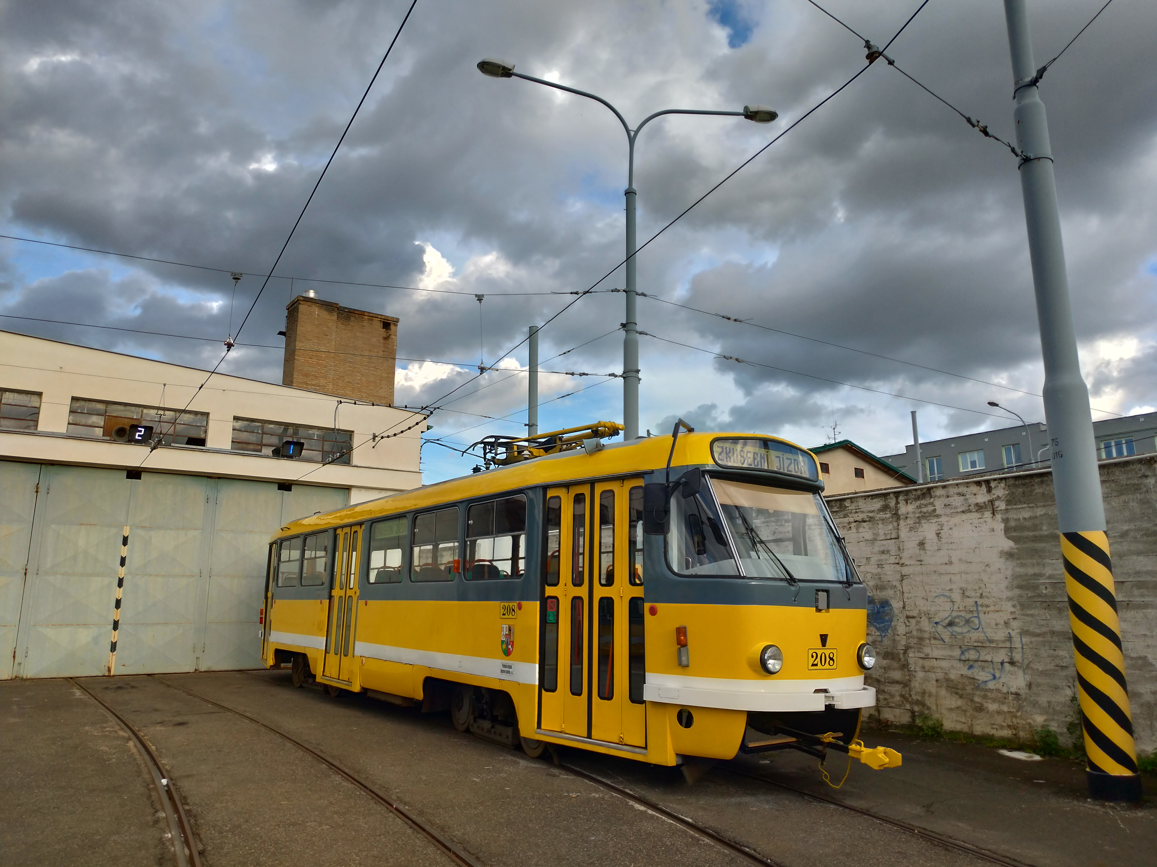 Tramvaj T3R.P v Plzeňské vozovně na Slovanech